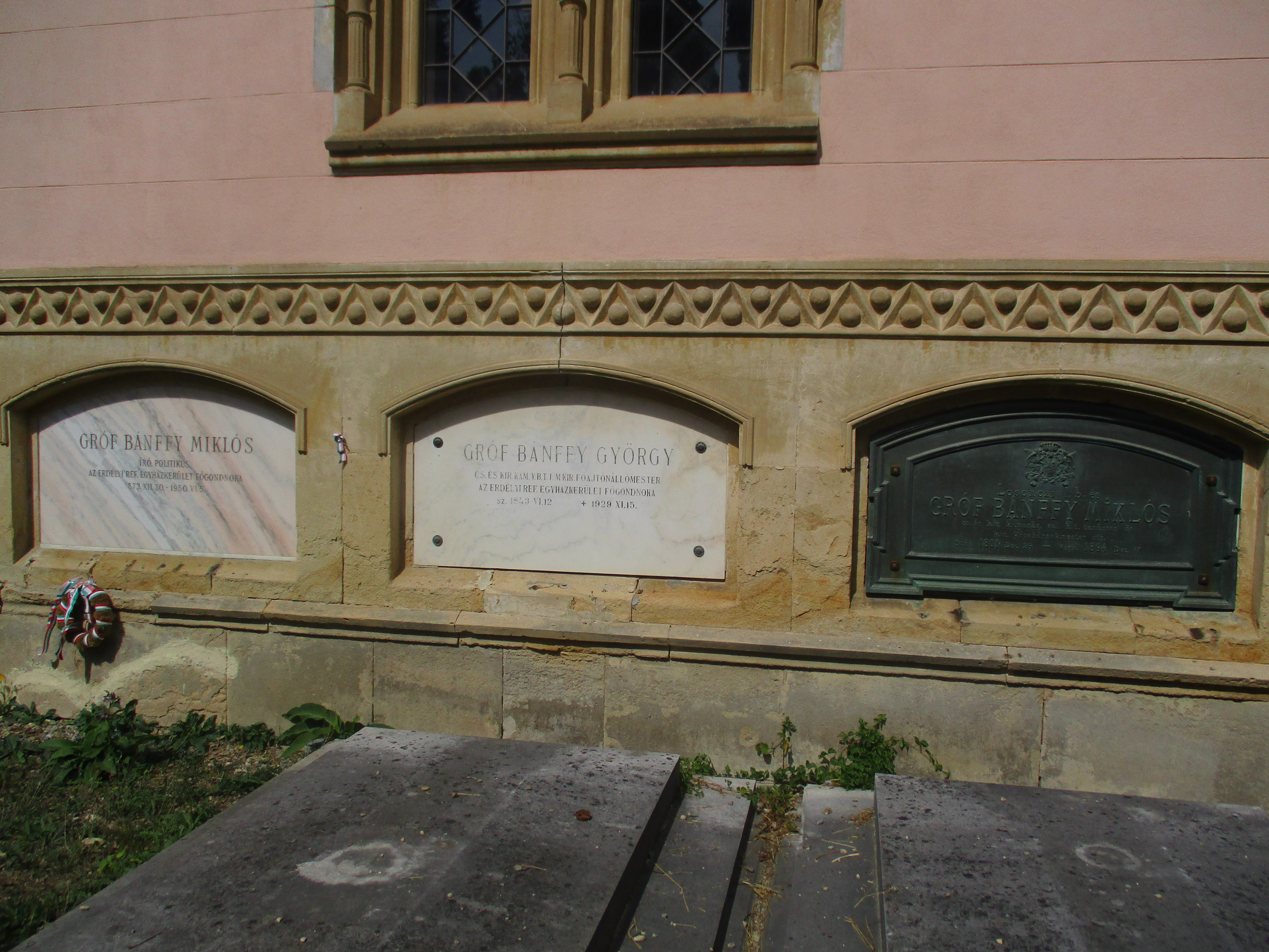 Piatra funerară a contelui Bánffy Miklós (1873–1950) in cavoul Bánffy, Cimitirul Central Cluj